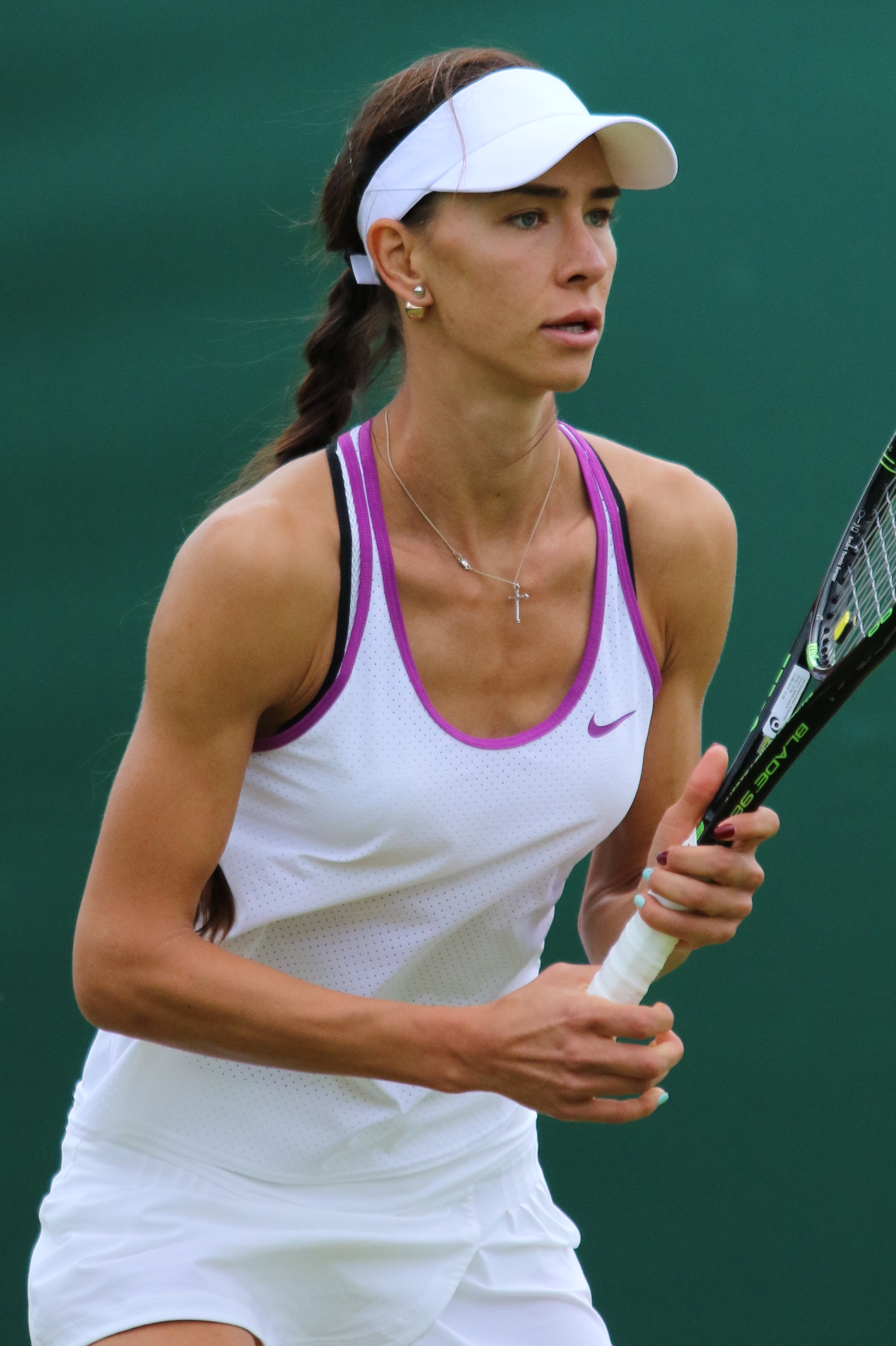 Pivovarova WMQ16 (3)